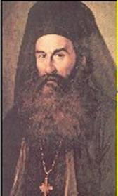 George Gotzias, Palaion Patron Germanos. Metropolitan /Patriarche métropolite Patras